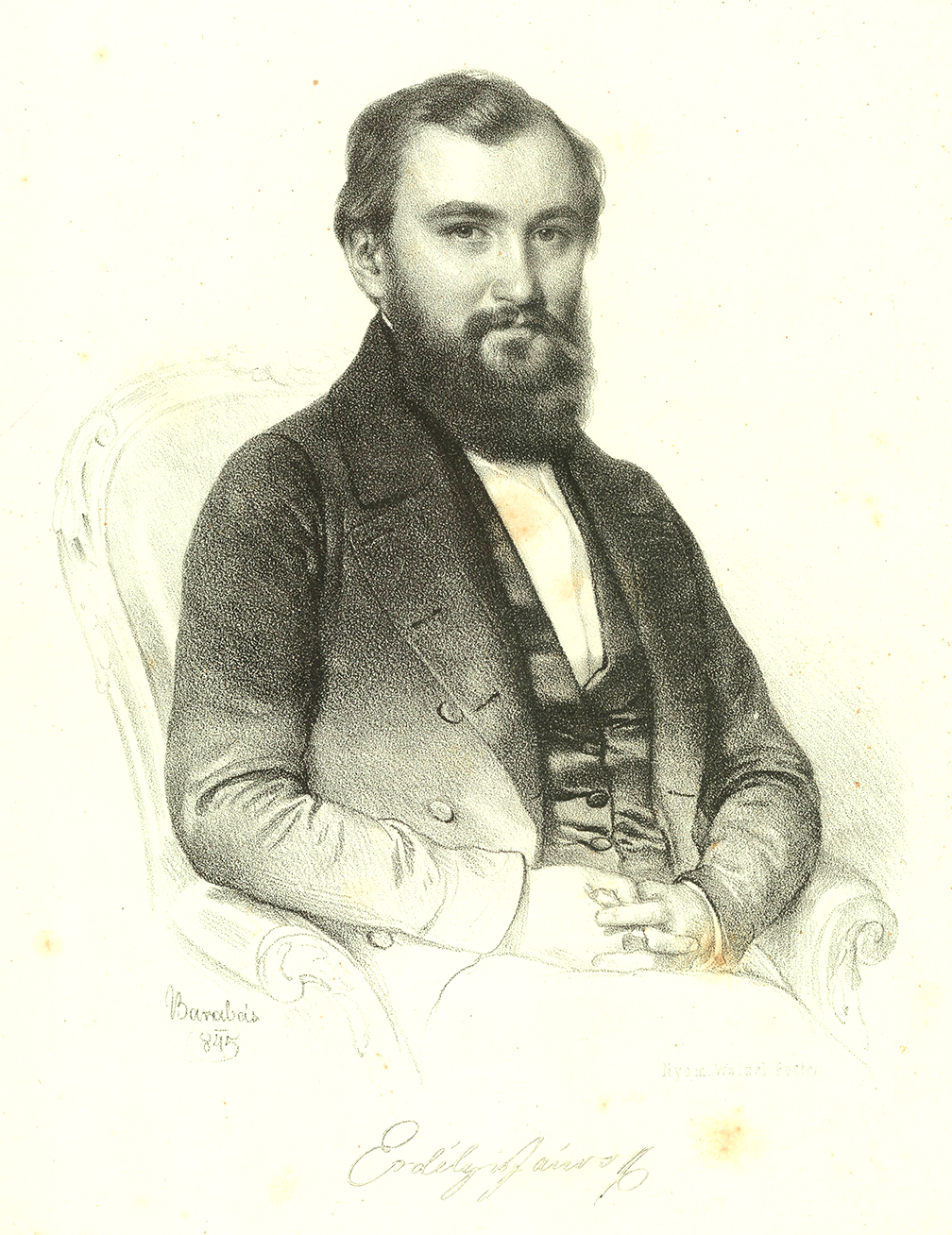 Erdélyi János (Kiskapos, 1814. április 1. – Sárospatak, 1868. január 23.) ügyvéd, akadémiai tanár, az MTA rendes tagja, a Kisfaludy Társaság titkára, költő.